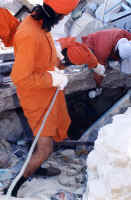 Ik heb de foto zelf gemaakt in Gujarat (India) in 2001 werkend voor AMURT USA